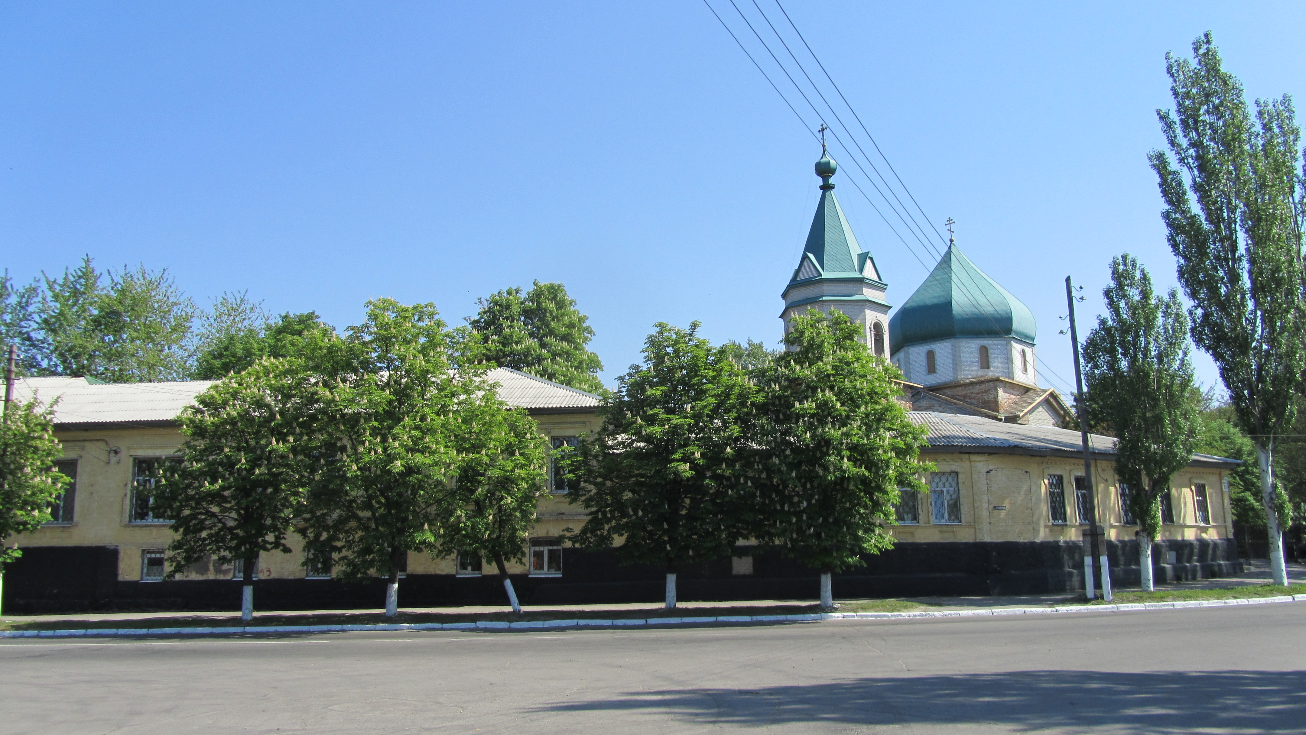 Церква Успіння Божої Матері, Кременчук, Вул. Макаренка, 107